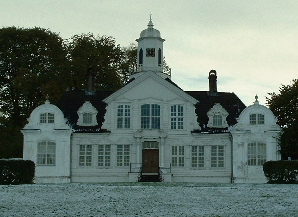 Damsgård hovedgård. Dette er et av hovedverkene i norsk rokokkoarkitektur.